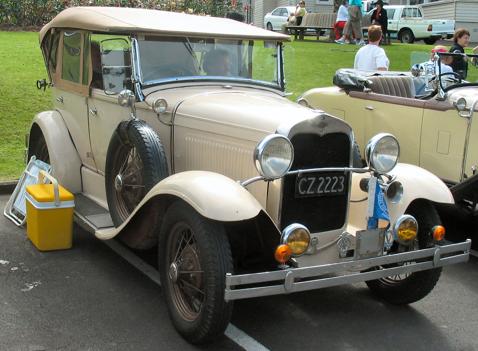 1930 Ford Model A, in Auckland, New Zealand.